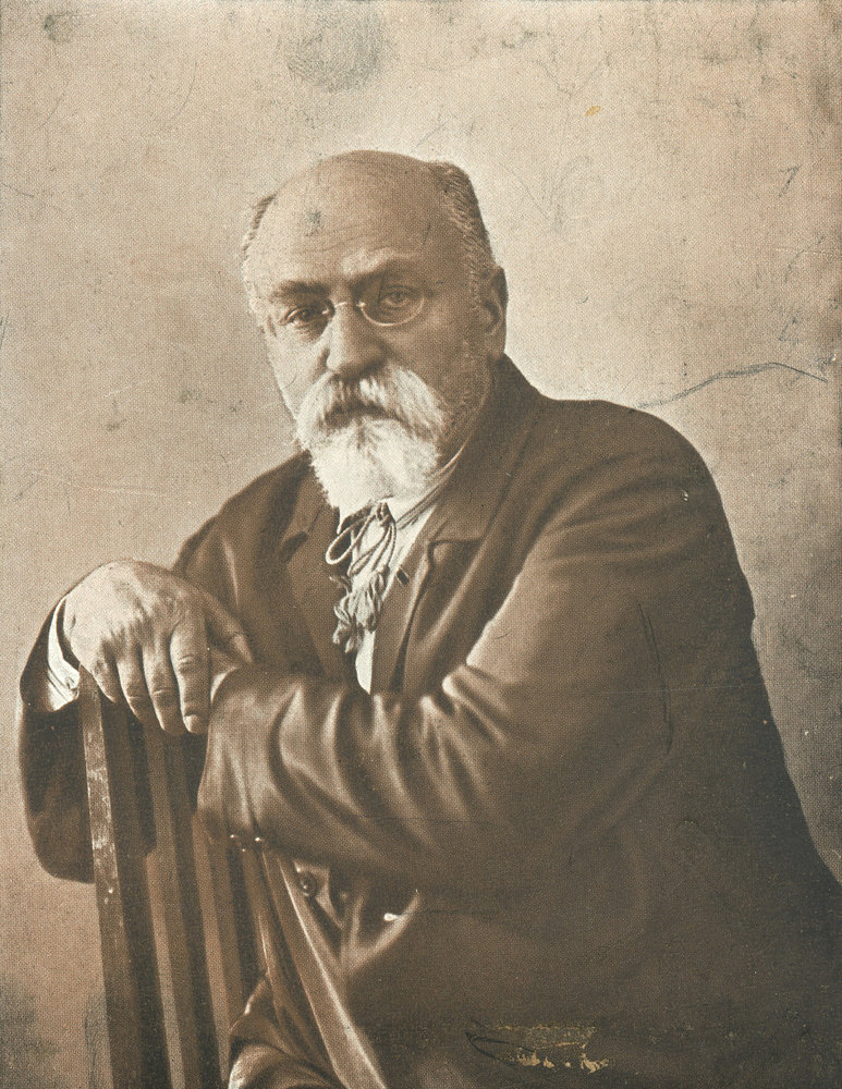 Fotografía del intelectual soviético David Riazanov